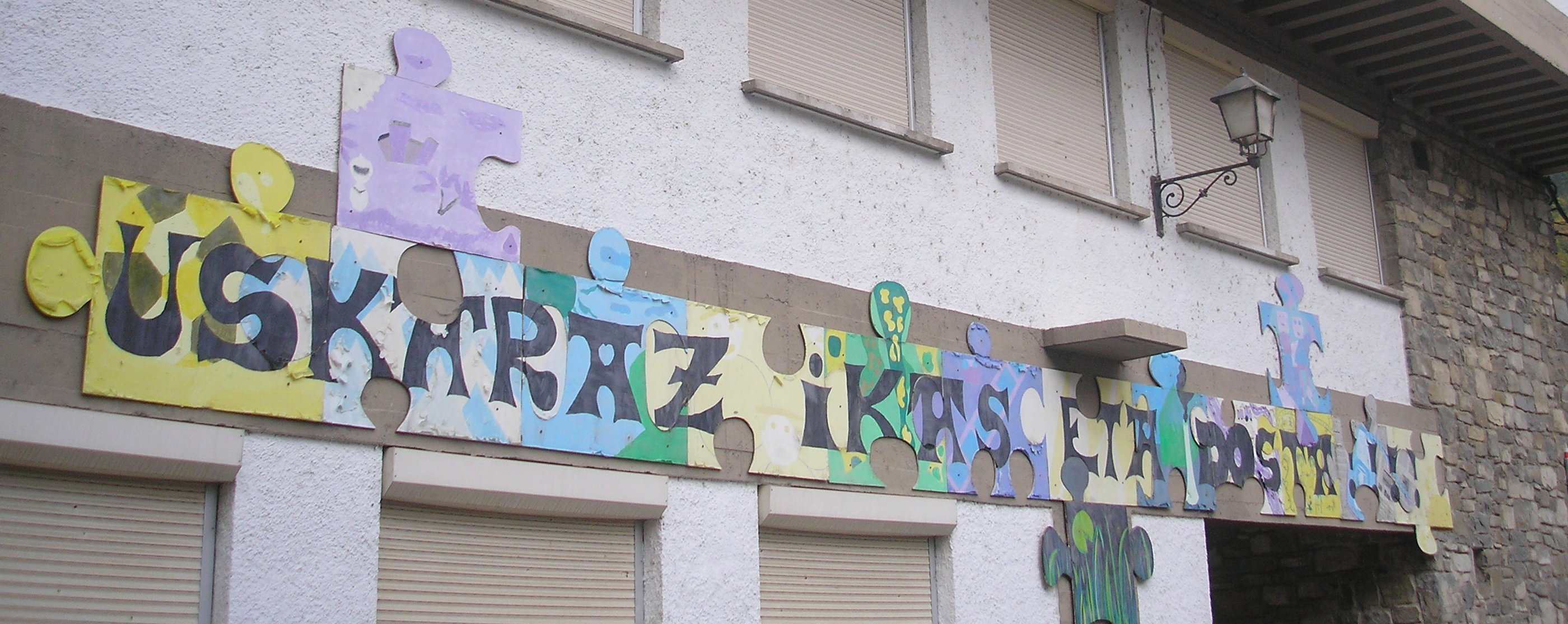 Otsagiko eskolan dagoen leloa: Uskaraz ikas eta dosta. Zaraitzueraz, jakina.